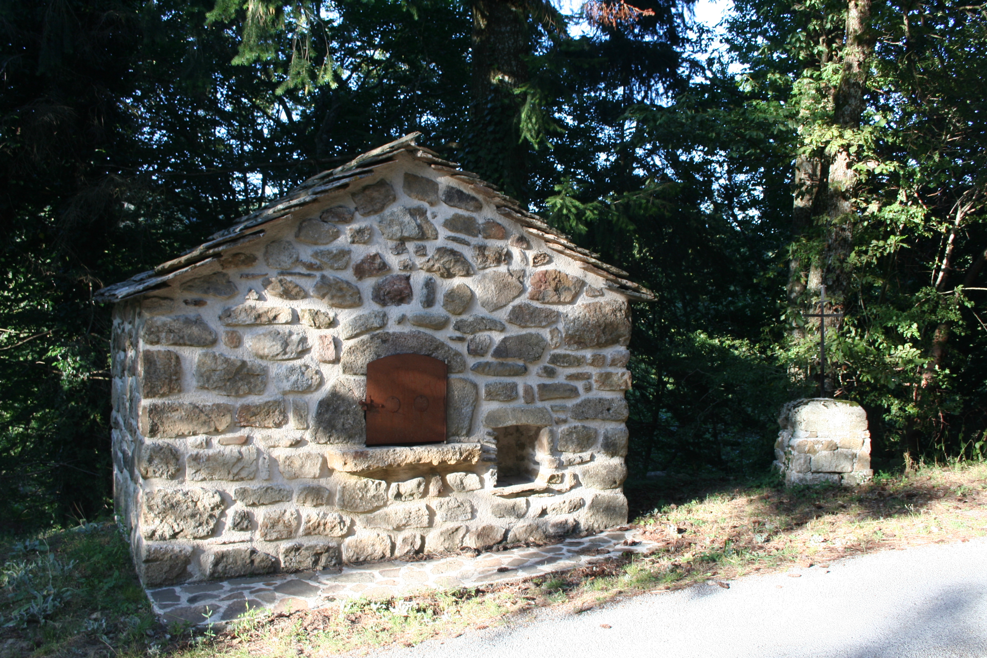 Cambon-et-Salvergues (Hérault) - four de Pont d'Agout.